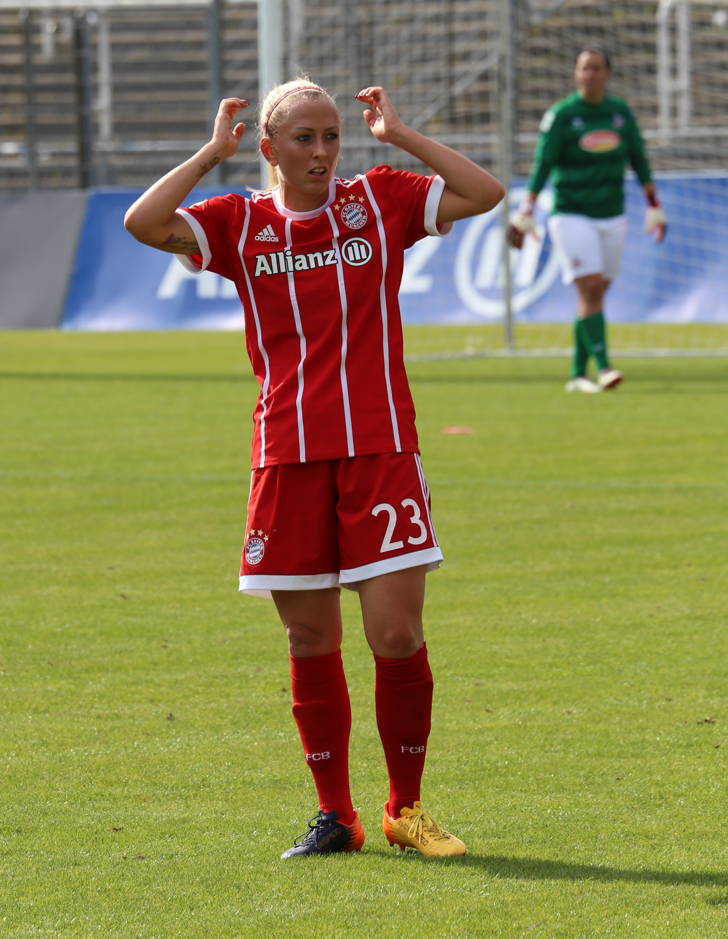 Mandy Islacker beim Frauen-Bundesliga-Spiel FC Bayern München gegen 1. FC Köln am 24. September 2017 im Stadion an der Grünwalder Straße (Ergebnis war 2:0)